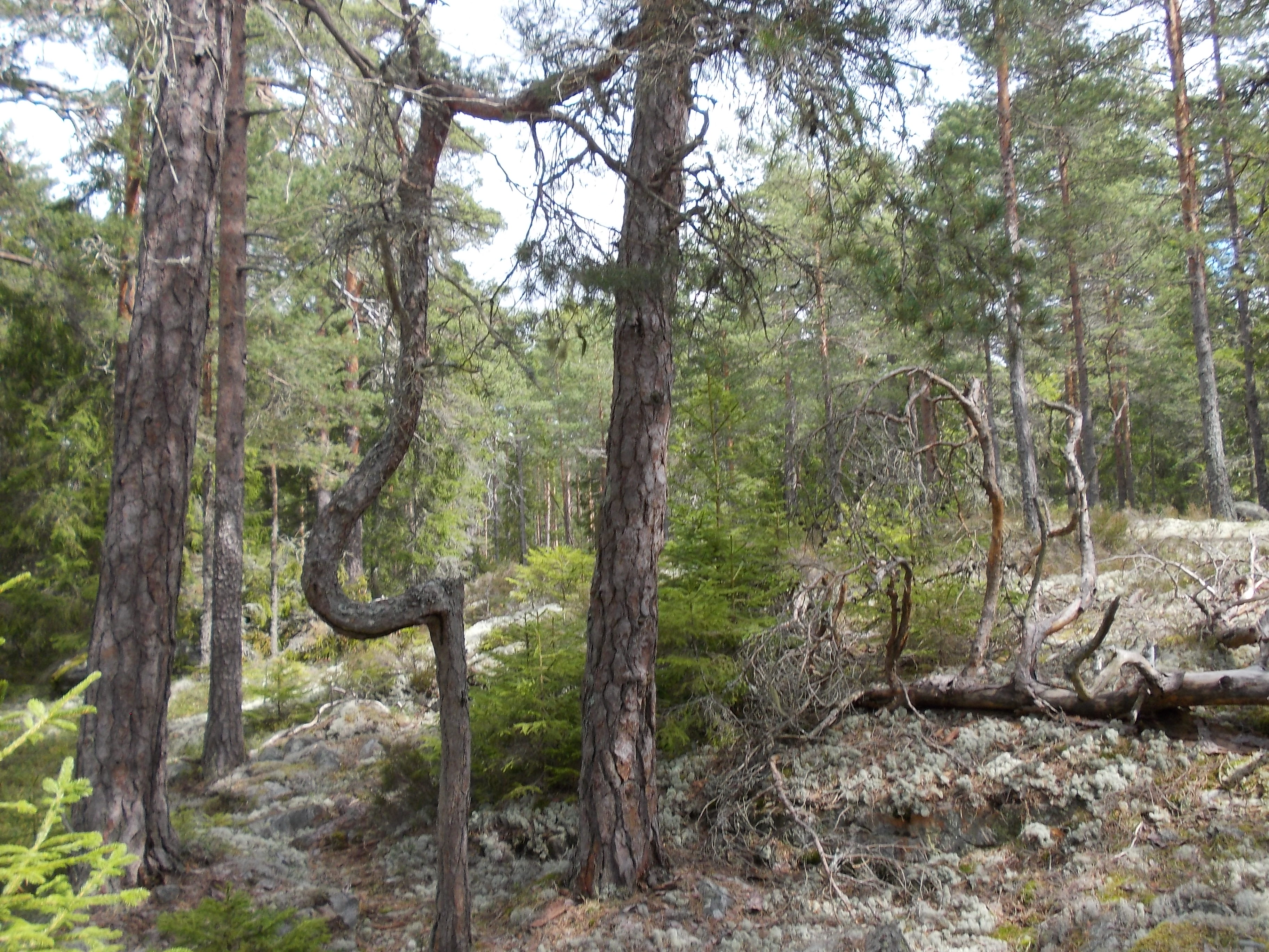 Skitåsen är ett naturreservat med gammal skog i Käglan i Närke.